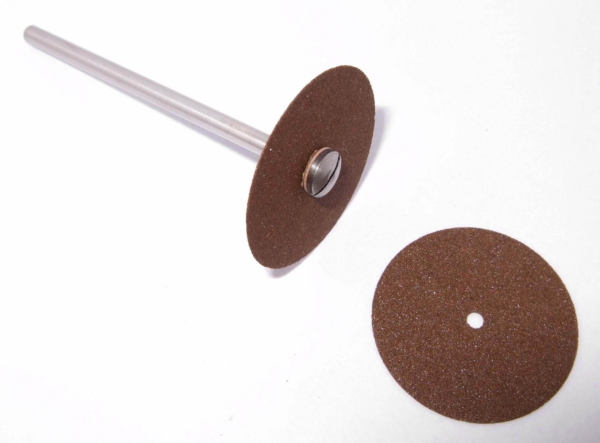 Chiok-po̍h hun-lî chhiat-phìⁿ Trennscheibe für Stabschleifer